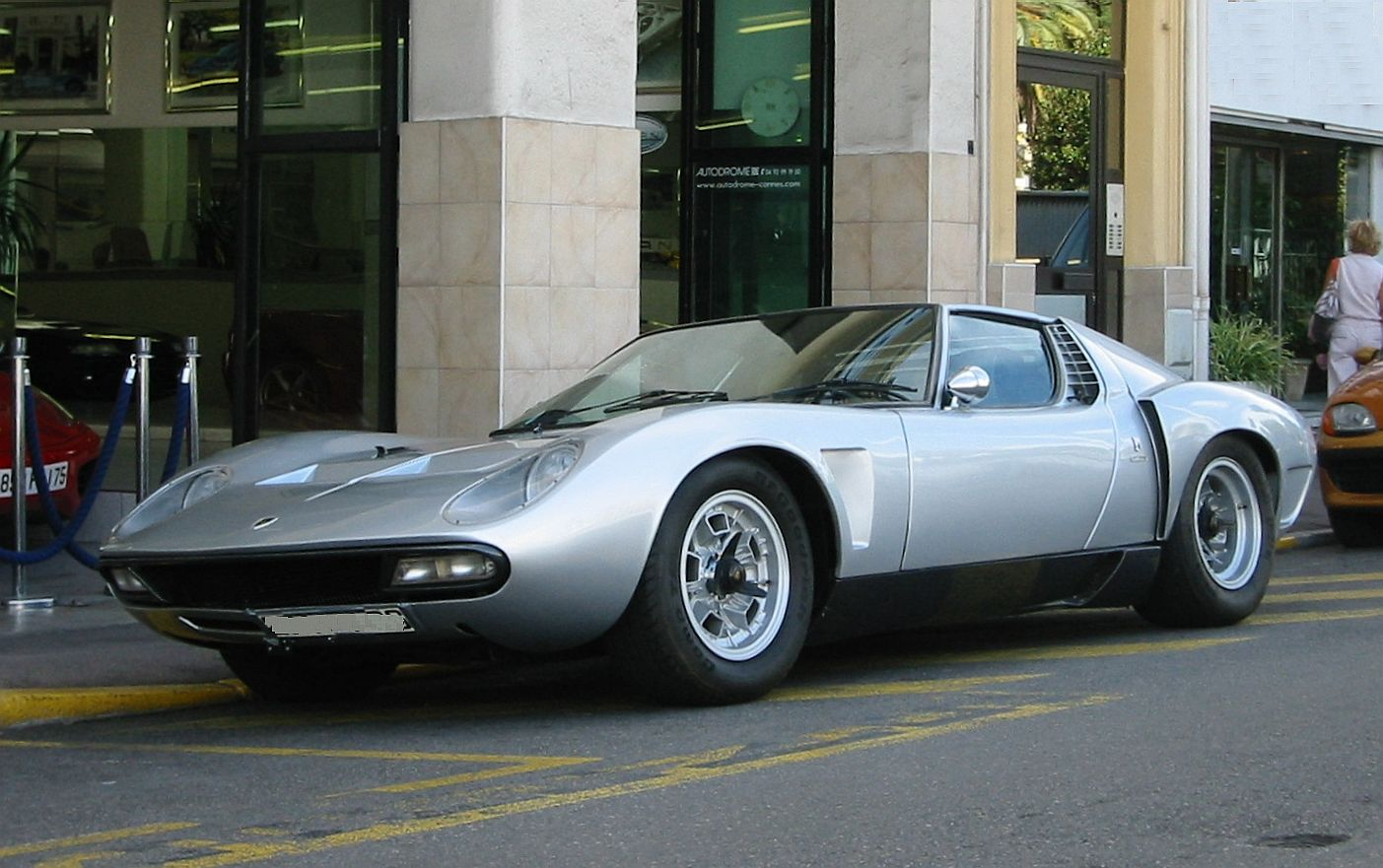 Lamborghini Miura SV J Spider 6666